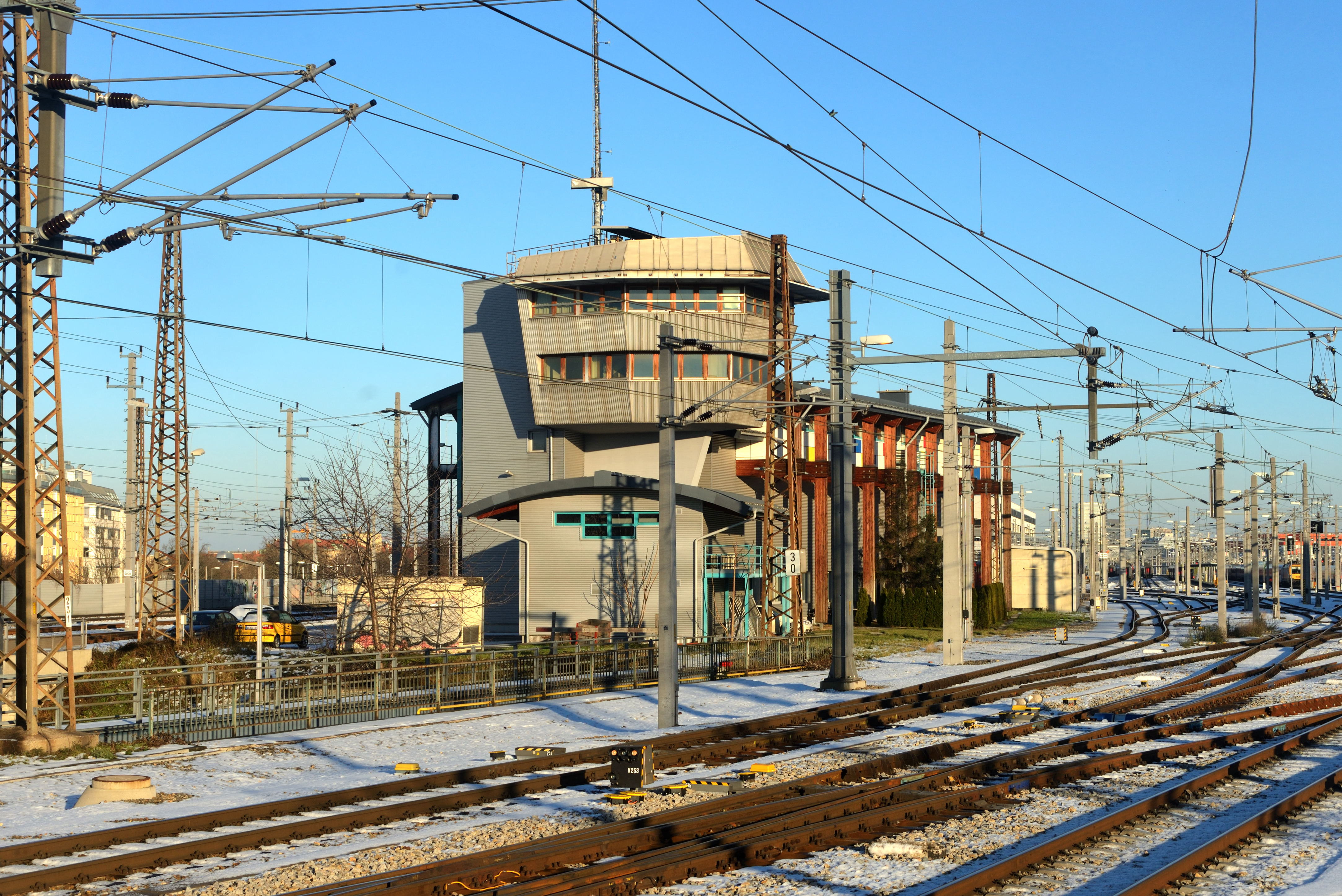 Stellwerk Wien Matzleinsdorf